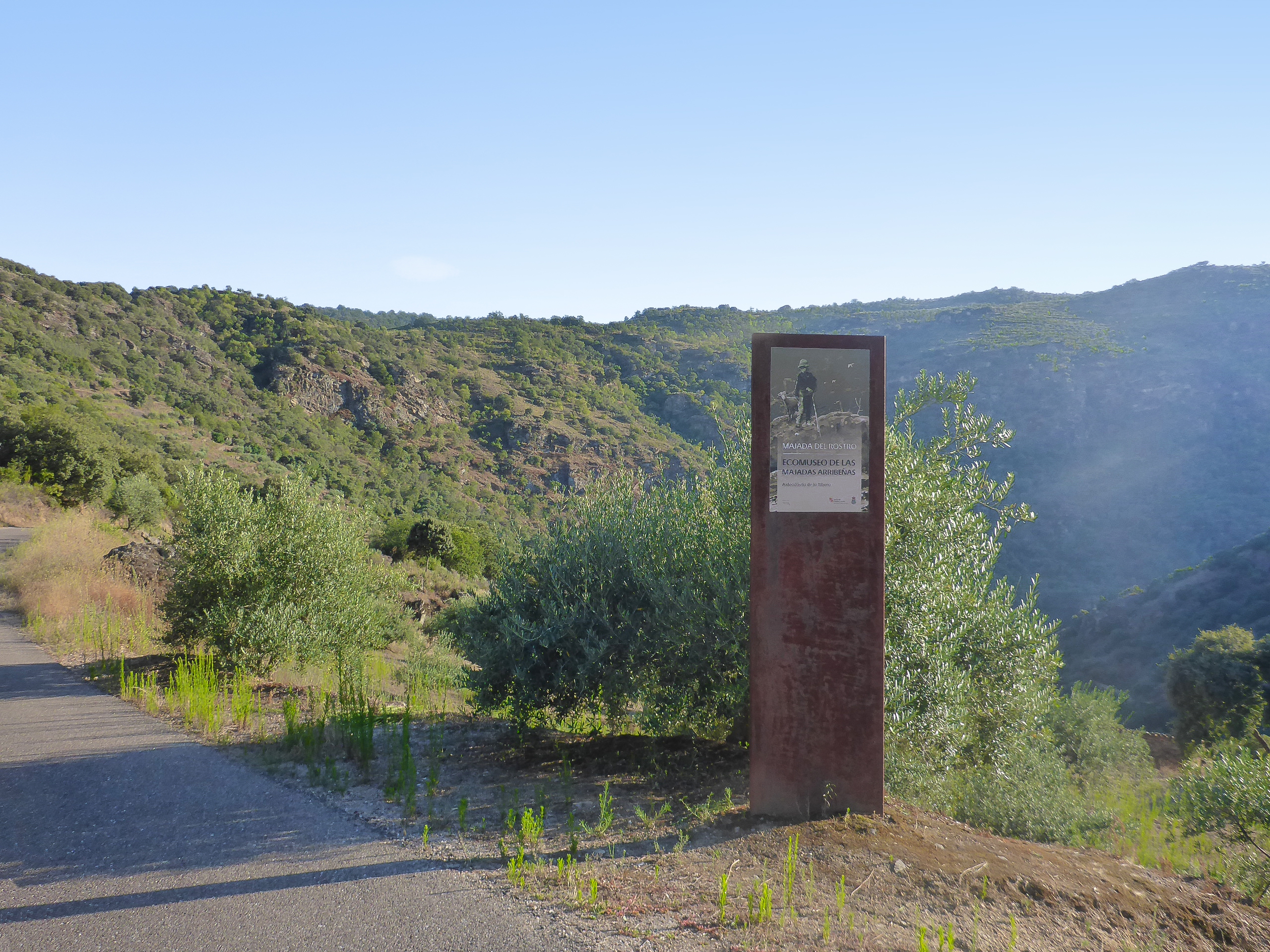 Cartel EcoMuseo de las Majadas Arribeñas, Corporario (Salamanca, España)